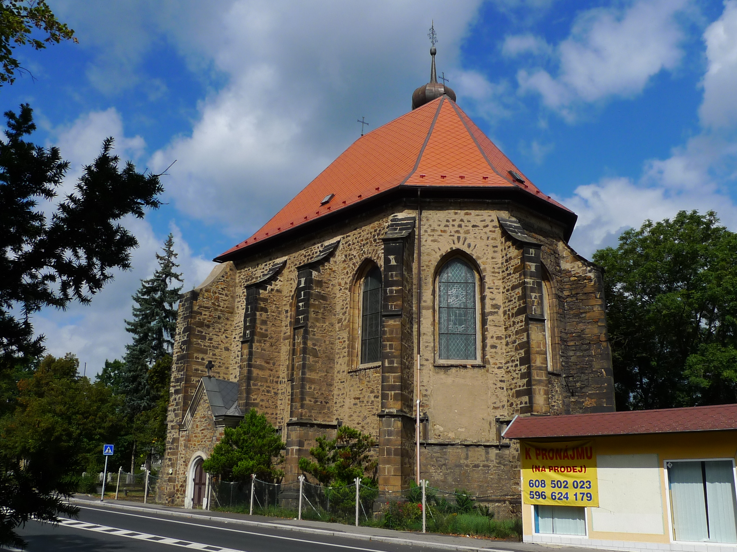 Kostel sv. Barbory (Chomutov), Horní Ves, Chomutov